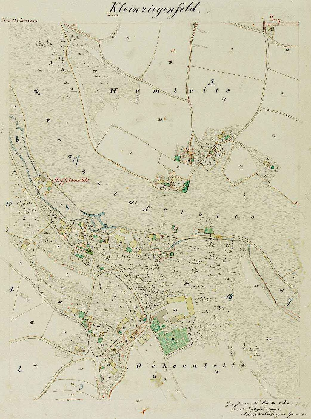 Historische Karte von Kleinziegenfeld